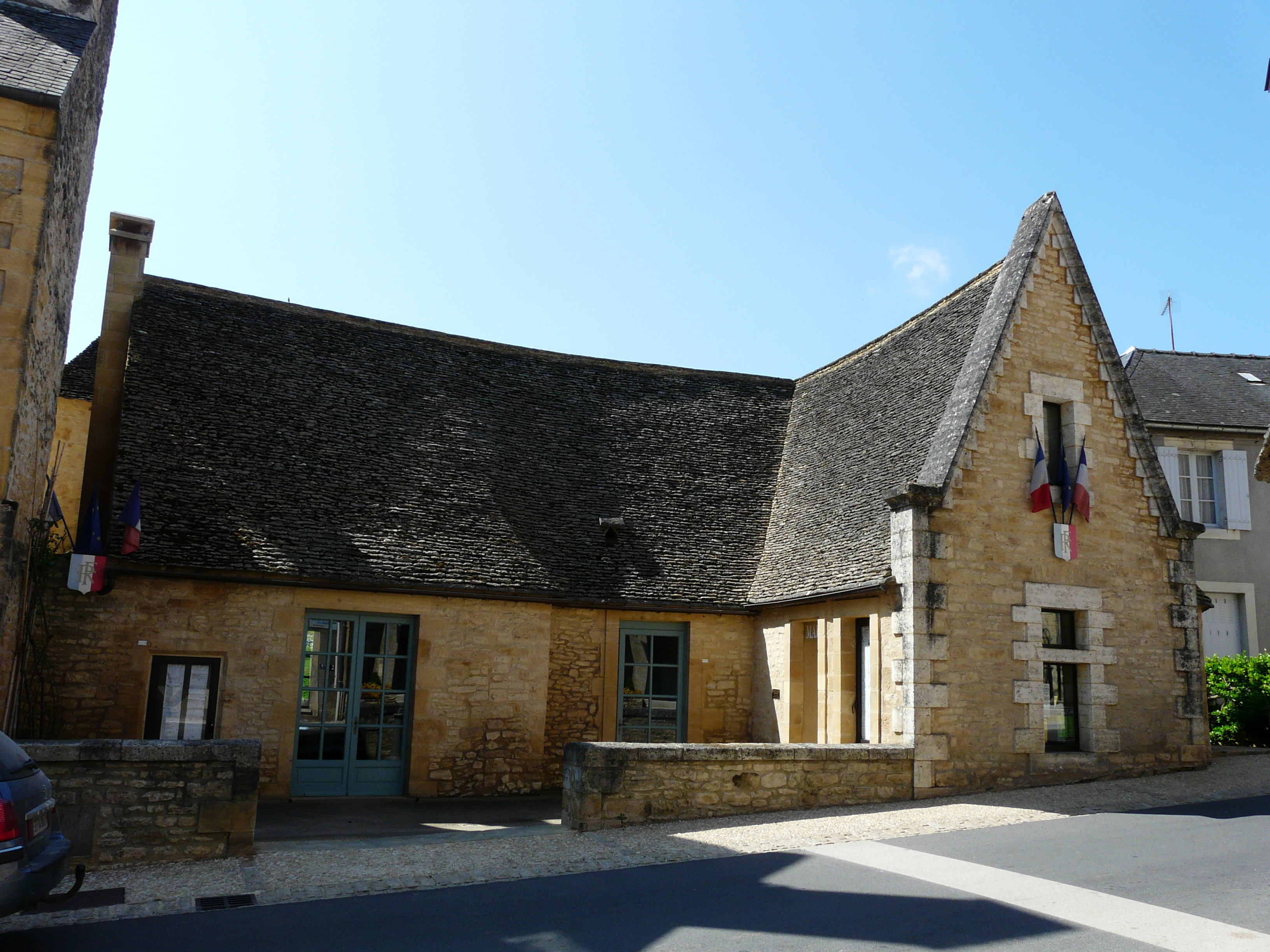 La mairie de Saint-Geniès, Dordogne, France.